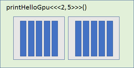 En blau la representació dels threads, englobats en els blocks grisos, dintre d'un grid, representat en verd. La quantitat de threads i blocks creats ve definida desde la crida a la funció.